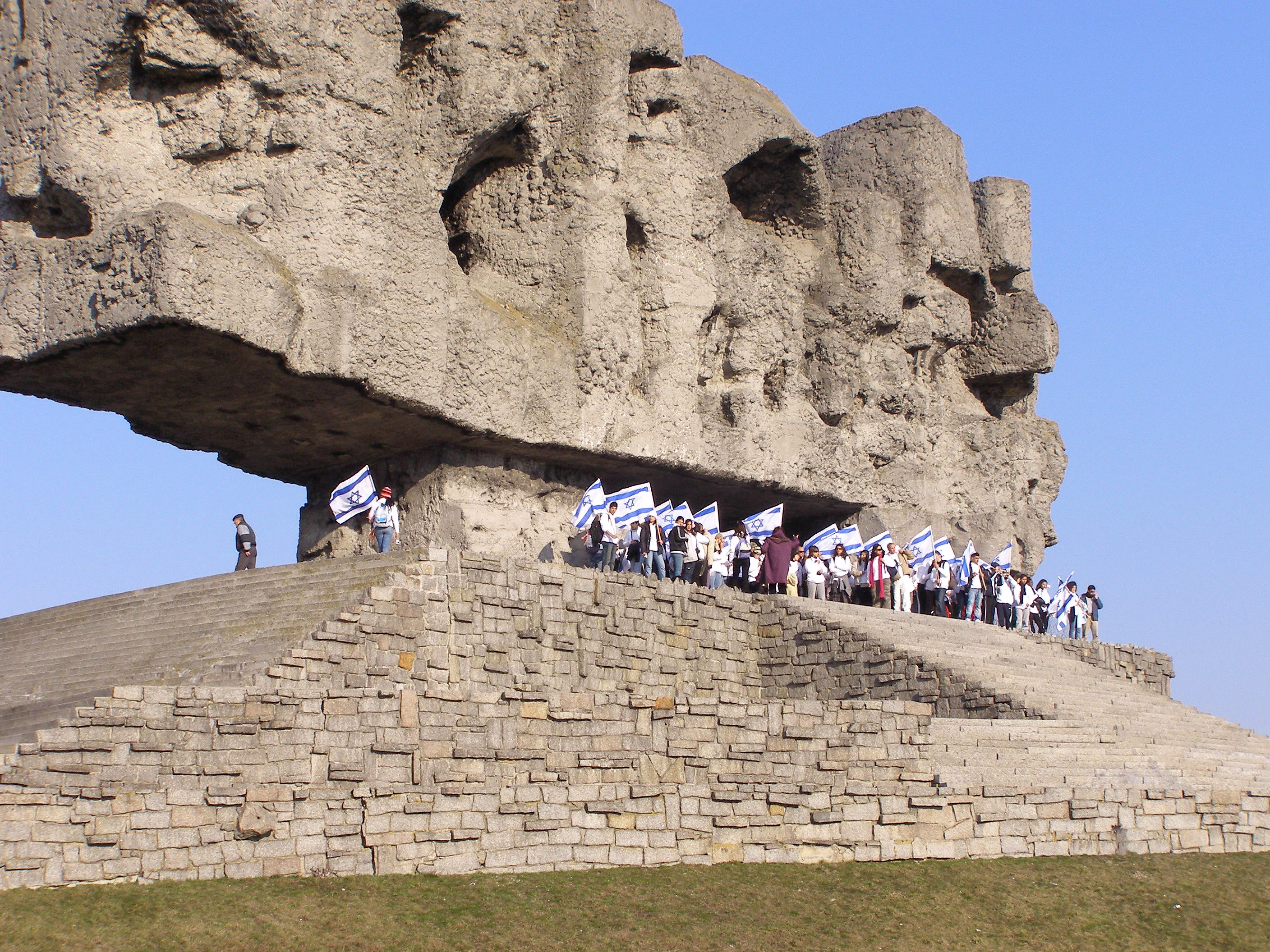 Marsz Żywych z Izraela przy Pomniku Męczenników Majdanka w Lublinie w roku 2007